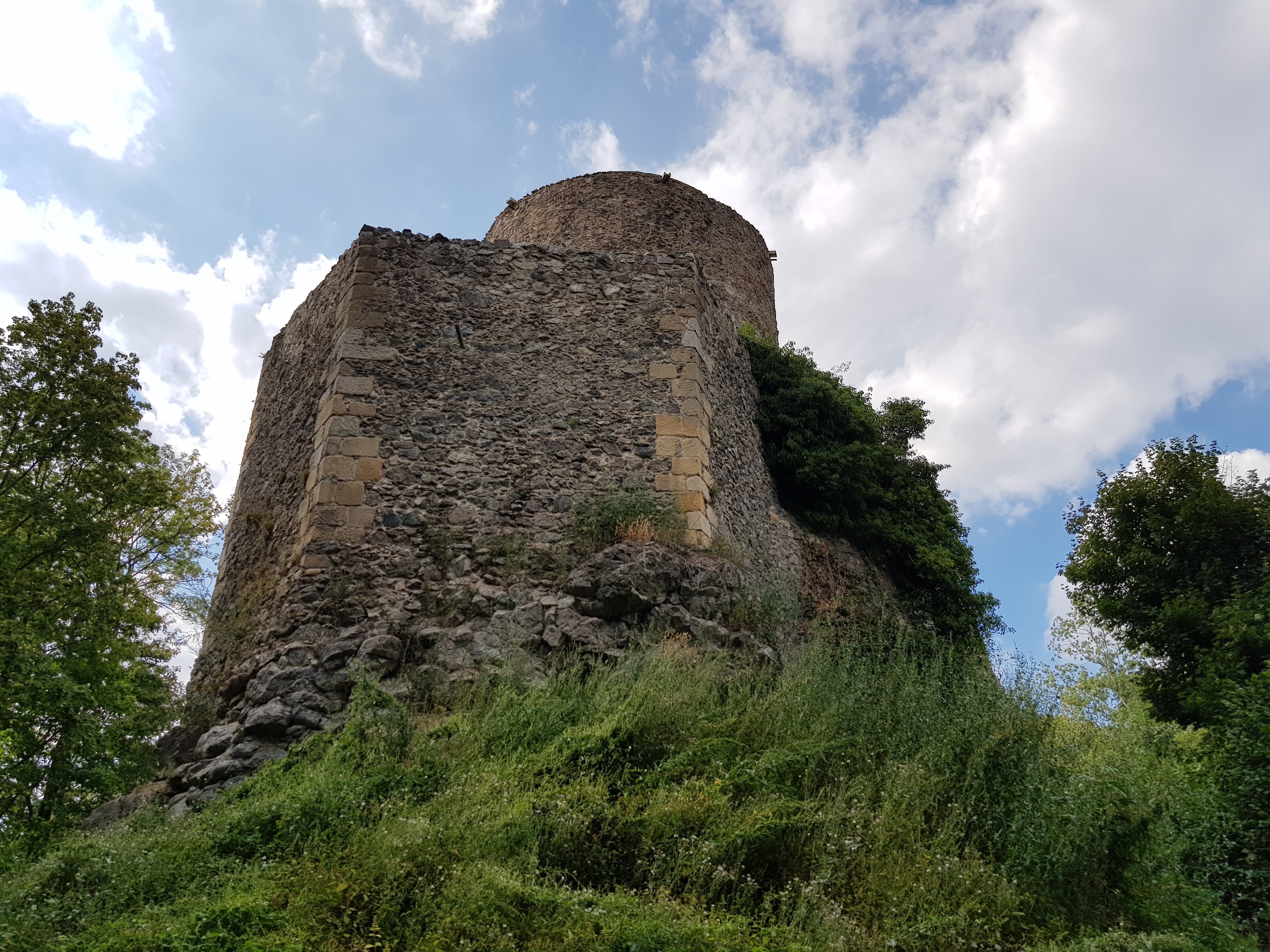 Łupki, Zamek Wleń Wikidata has entry Q8716748 with data related to this item.